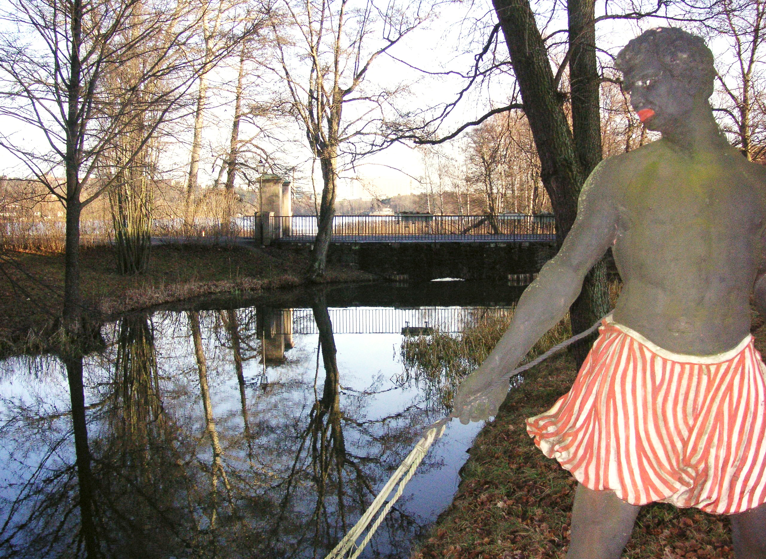 Nätdragande morian i Ulriksdals slottsträdgård